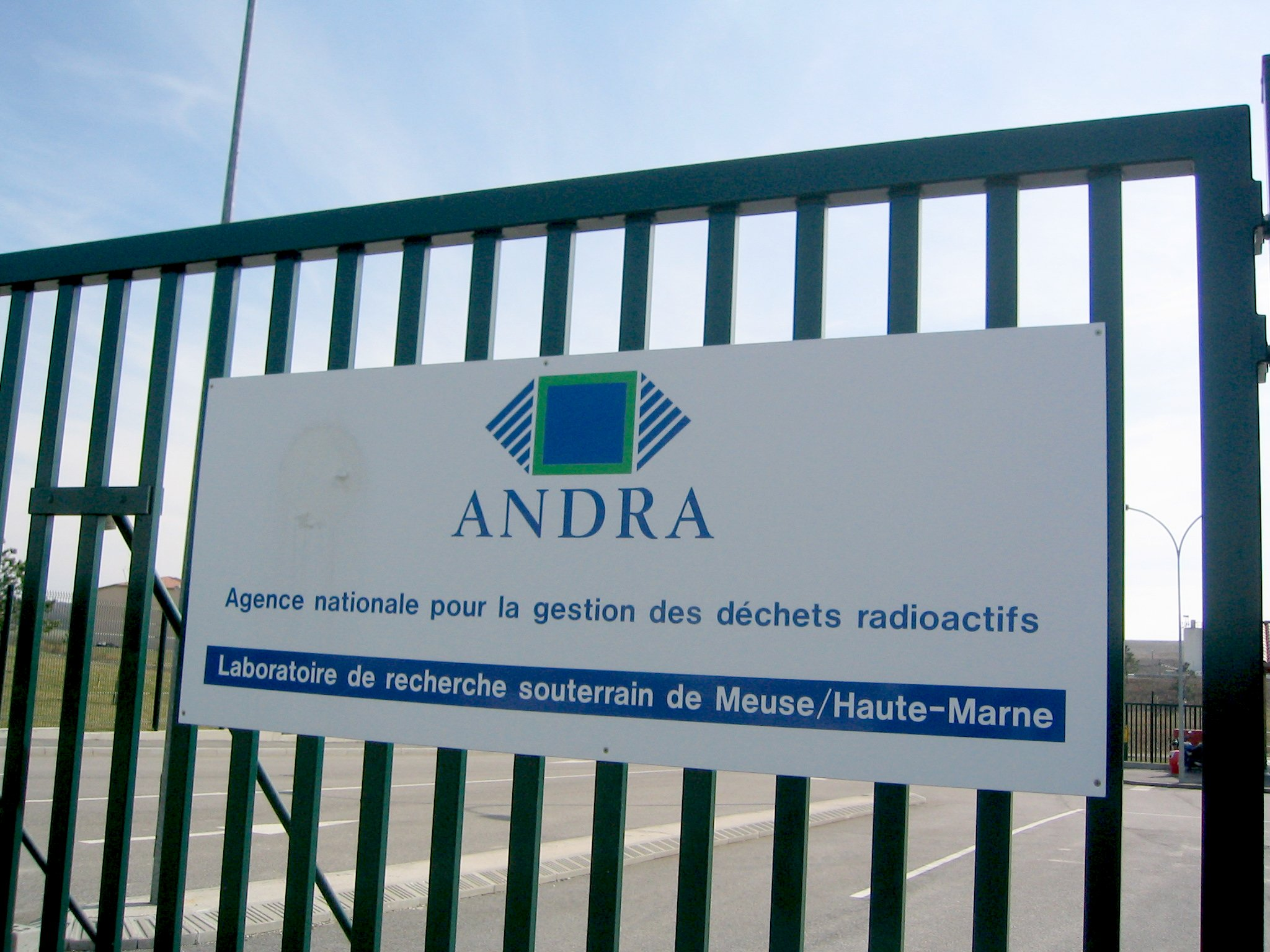 Entrée du Laboratoire de recherche souterrain à Bure (Meuse) - ANDRA : Agence nationale pour la gestion des déchets radioactifs